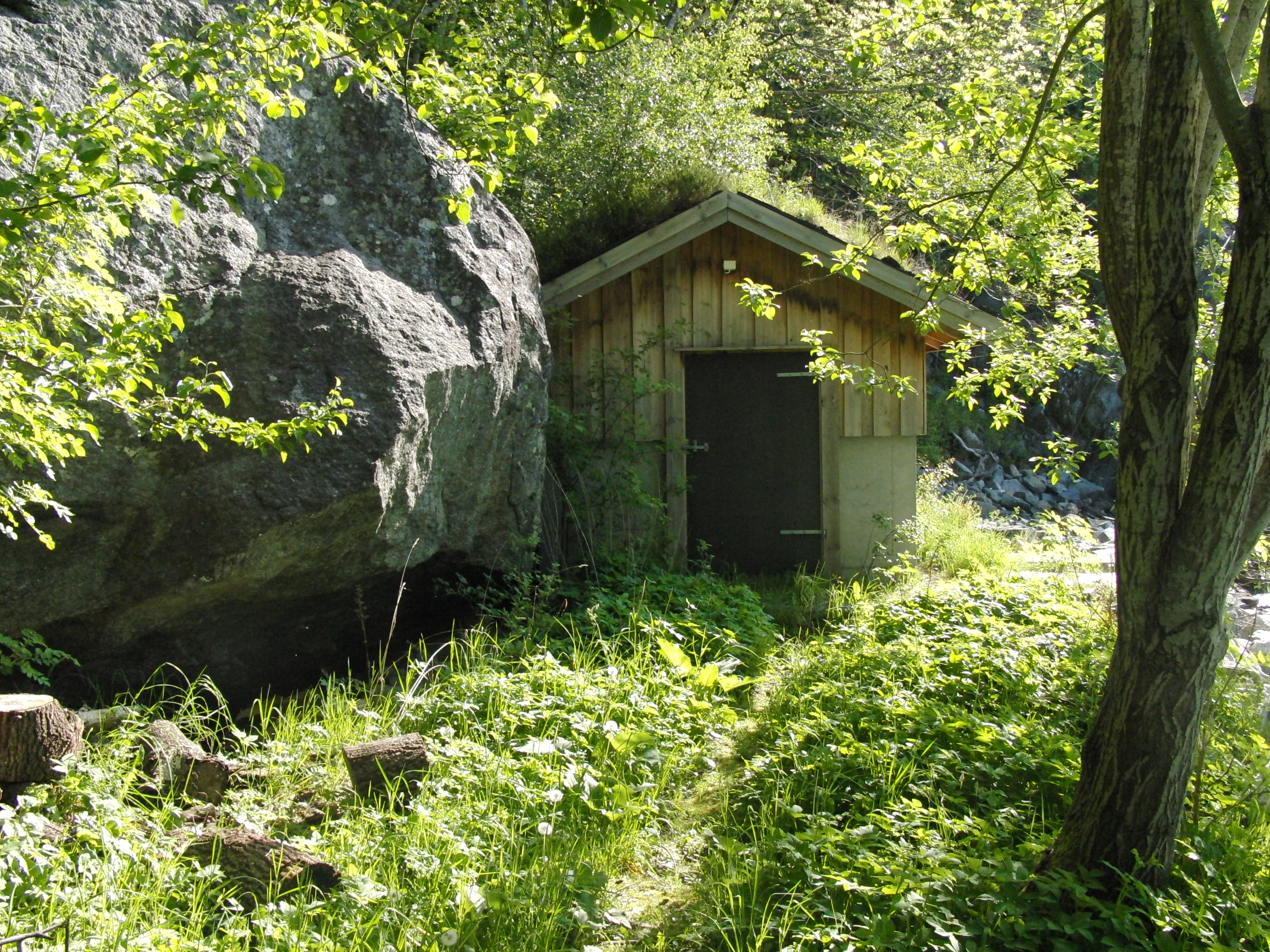 Fuglestein kraftverk